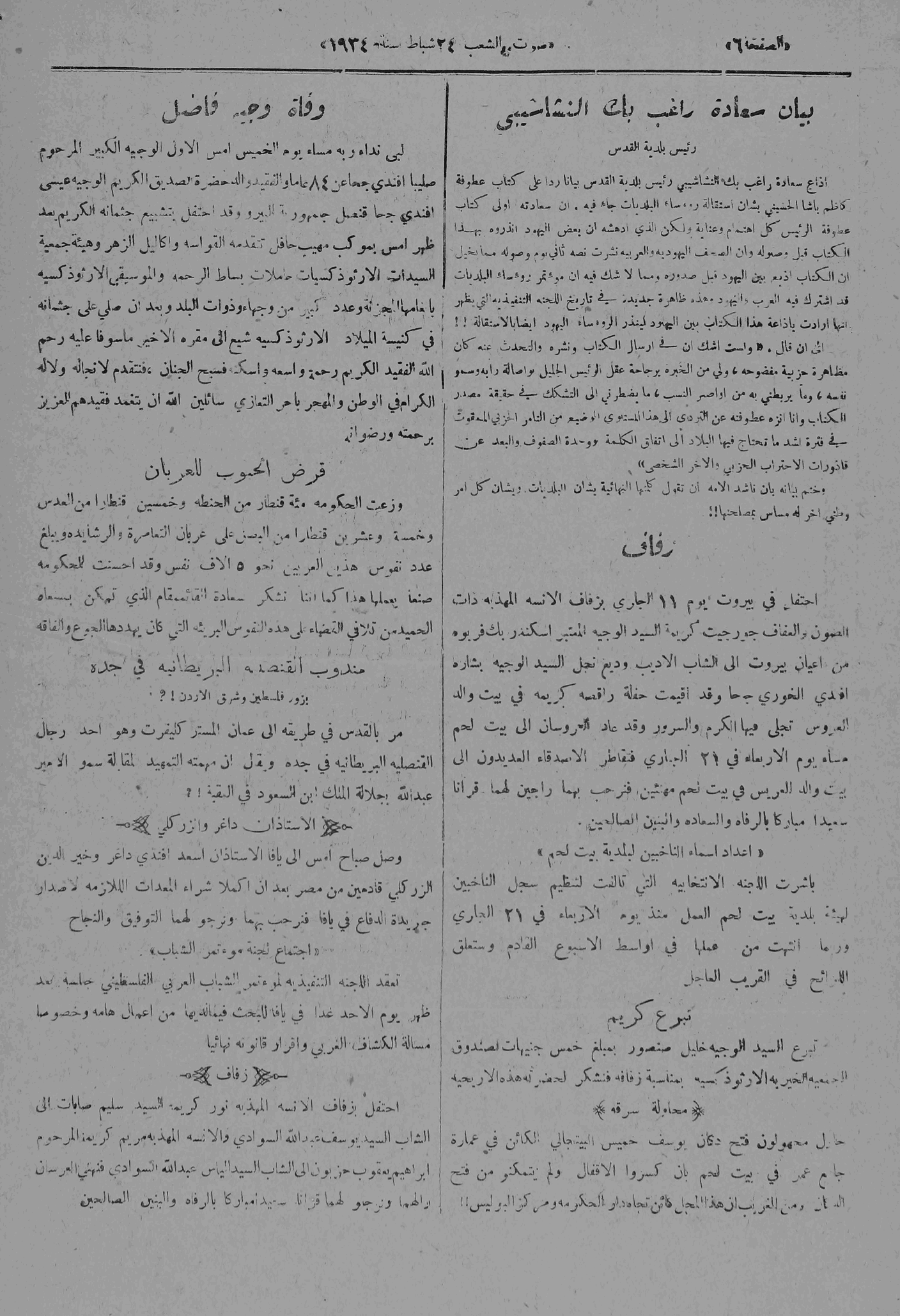 بيان صادر عن راغب بك النشاشيبي نشر في صحيفة صوت الشعب في 24 شباط 1934